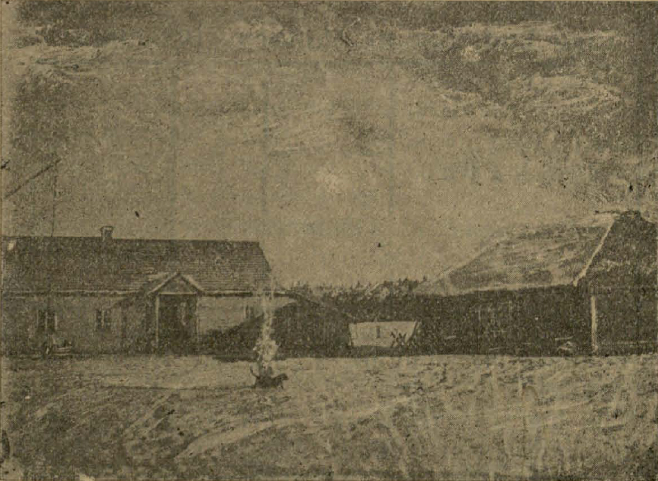 Беларуская (тарашкевіца): Бабоўня (Baboŭnia). Хутар